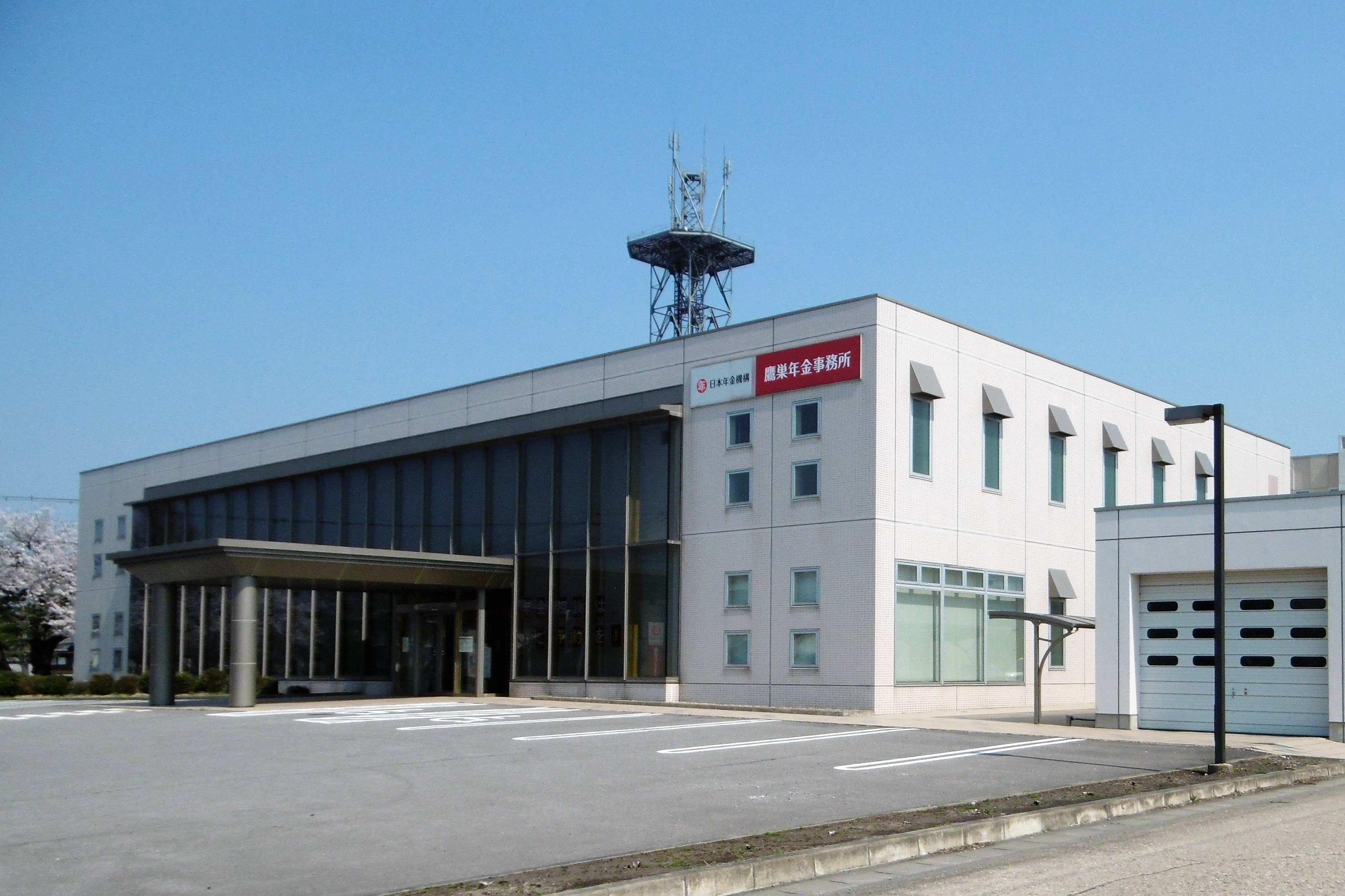 日本年金機構 鷹巣年金事務所：秋田県北秋田市